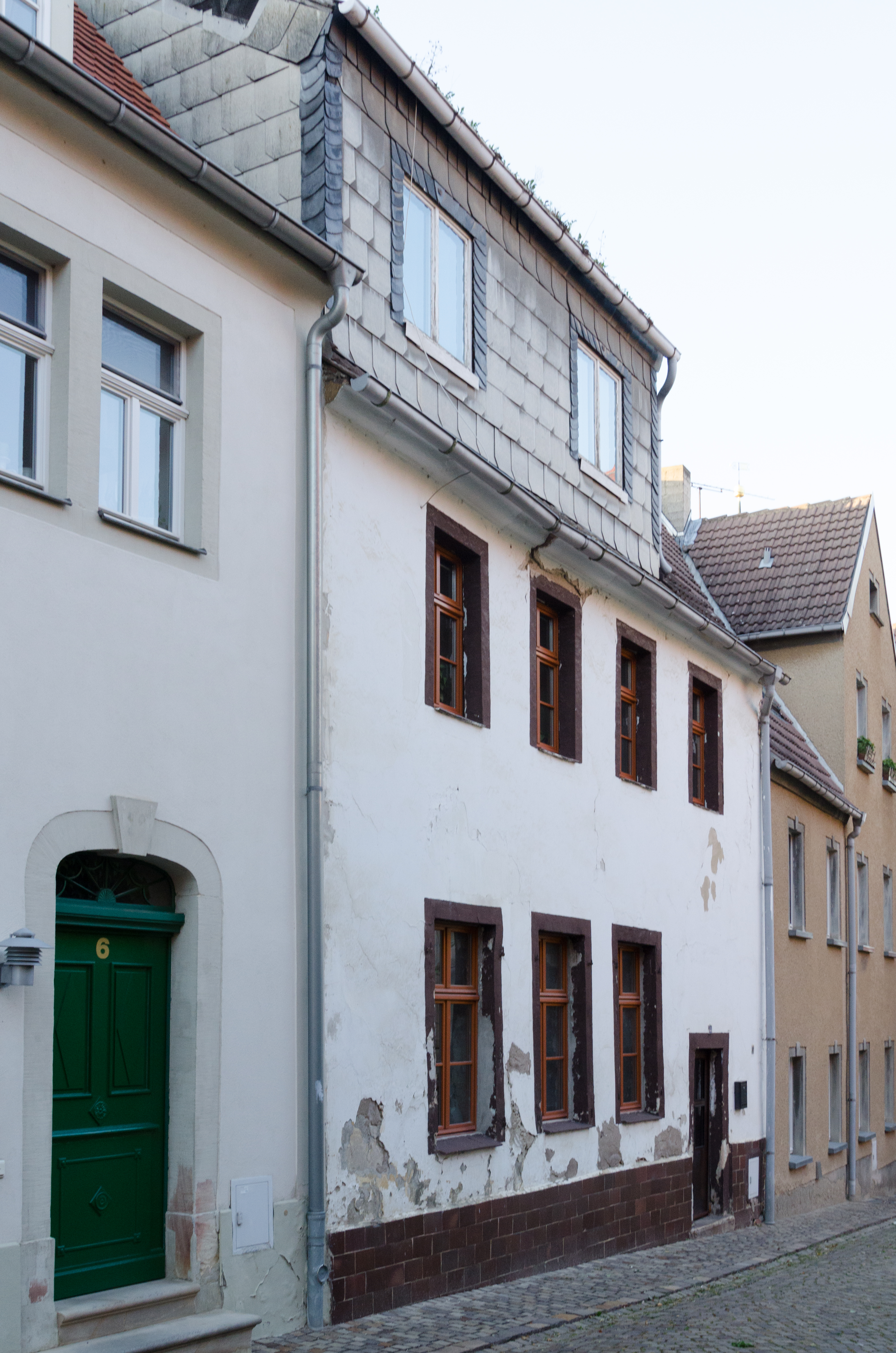 Querfurt, Burgstraße 4